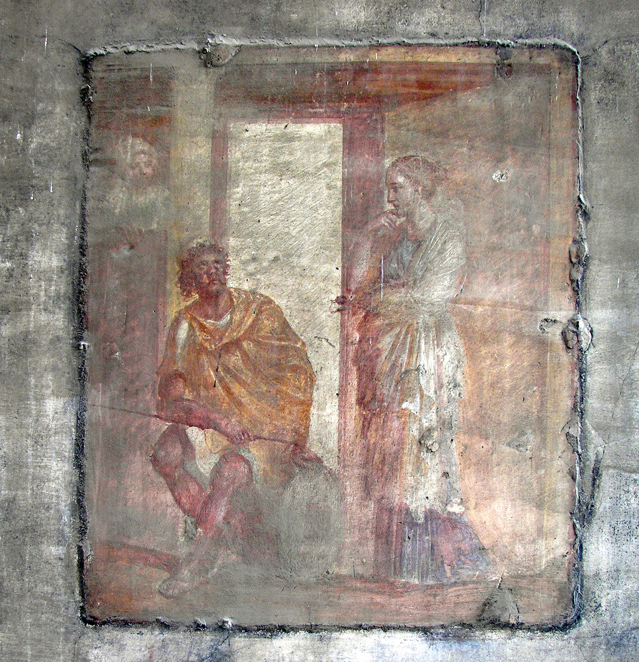 Fresco in the macellum at Pompeii.